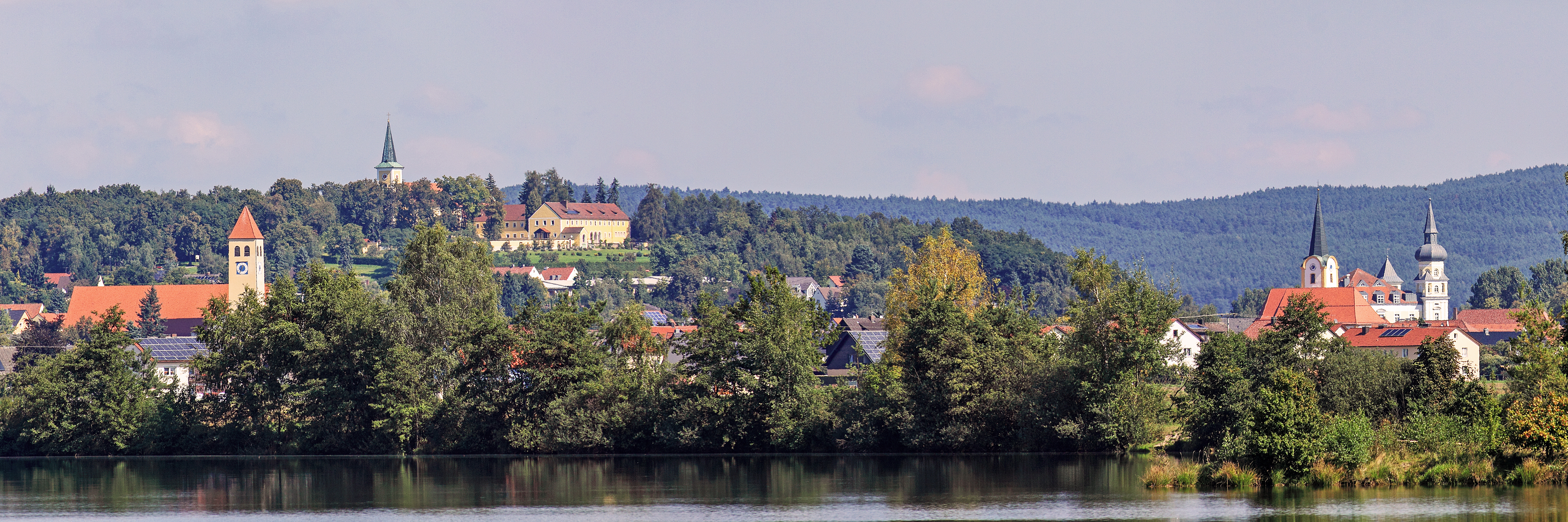 Blick von Süden auf Schwarzenfeld